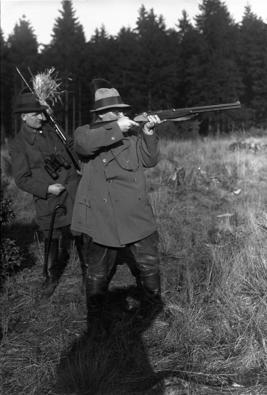 Reichsjägermeister Hermann Göring auf der Wildschweinjagd für die Winterhilfe im Staatsforst Springe bei Hannover am 14. Dezember 1934.